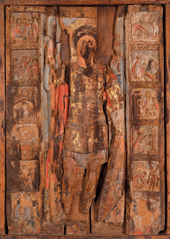 Зв'язок з візантійським мистецтвом, з його класичними антикізуючими традиціями простежується у рельєфній іконі «Святий Георгій у житії» XII століття.Невелика ікона «Покрова» кінця XII—початку XIII століття зі східної Галичини при­вертає увагу незвичайною іконографією і є, мабуть, однією з ранніх редакцій цього сюжету.